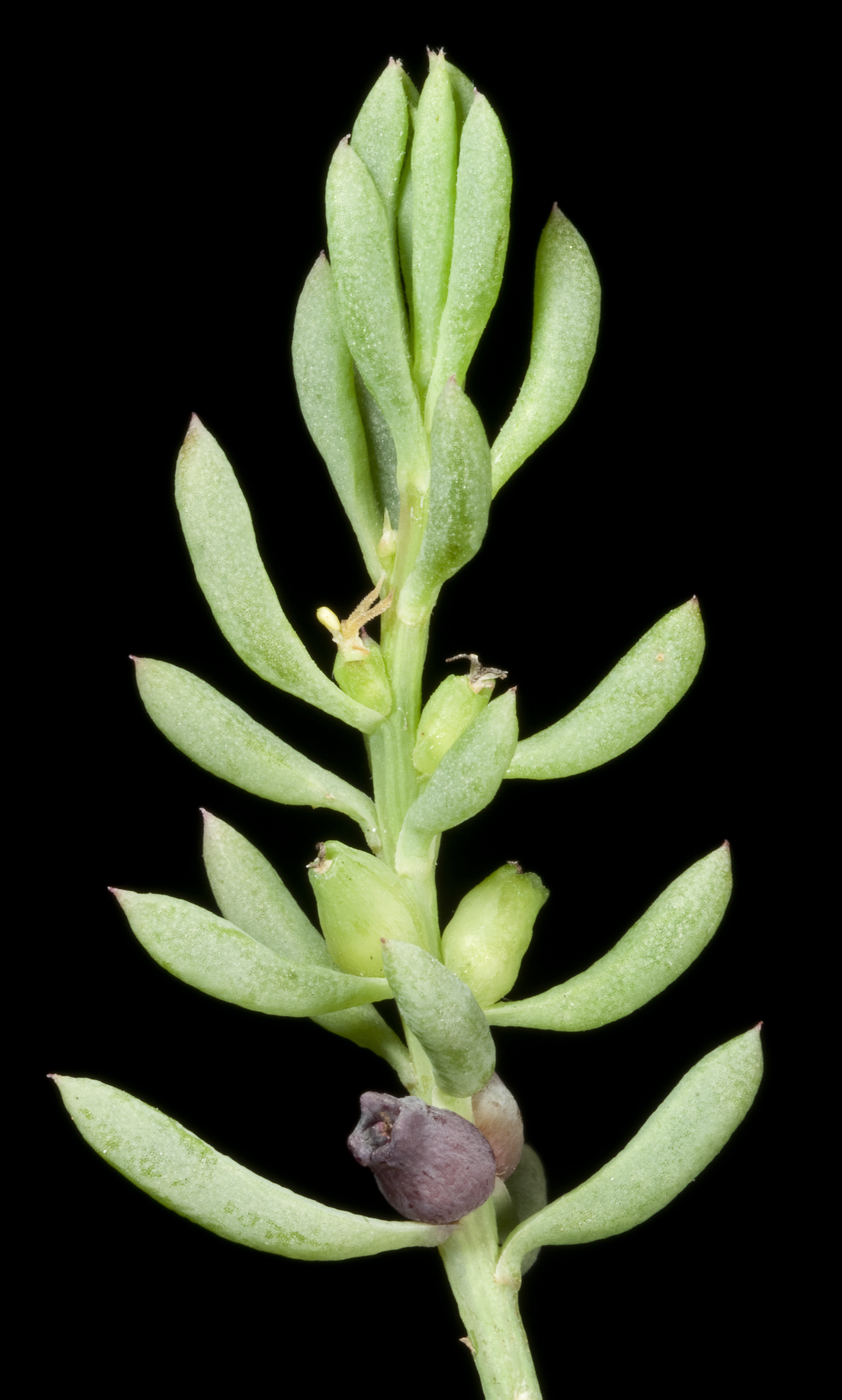 KRT4532